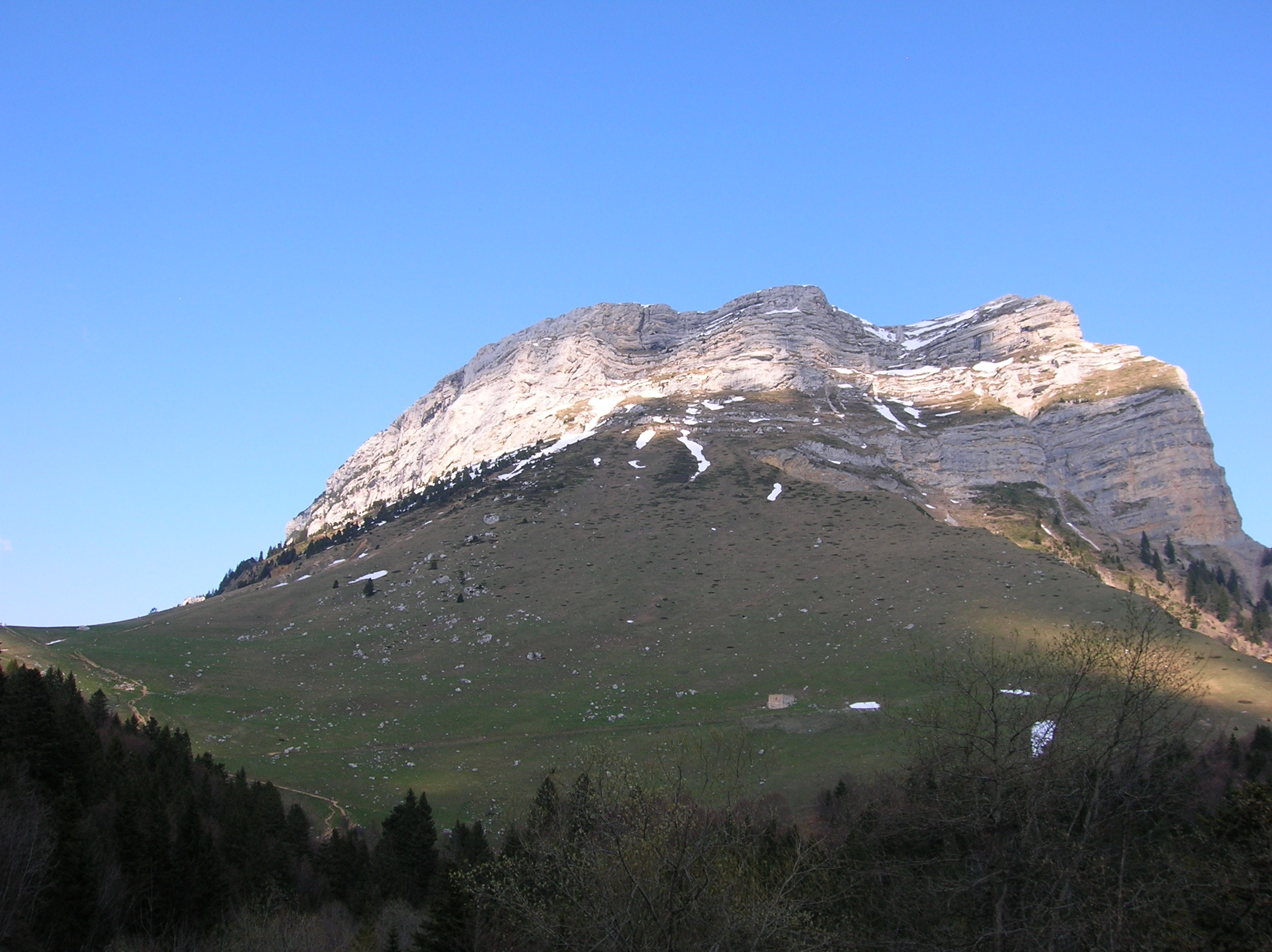 Dent de Crolles from the Col du Coq